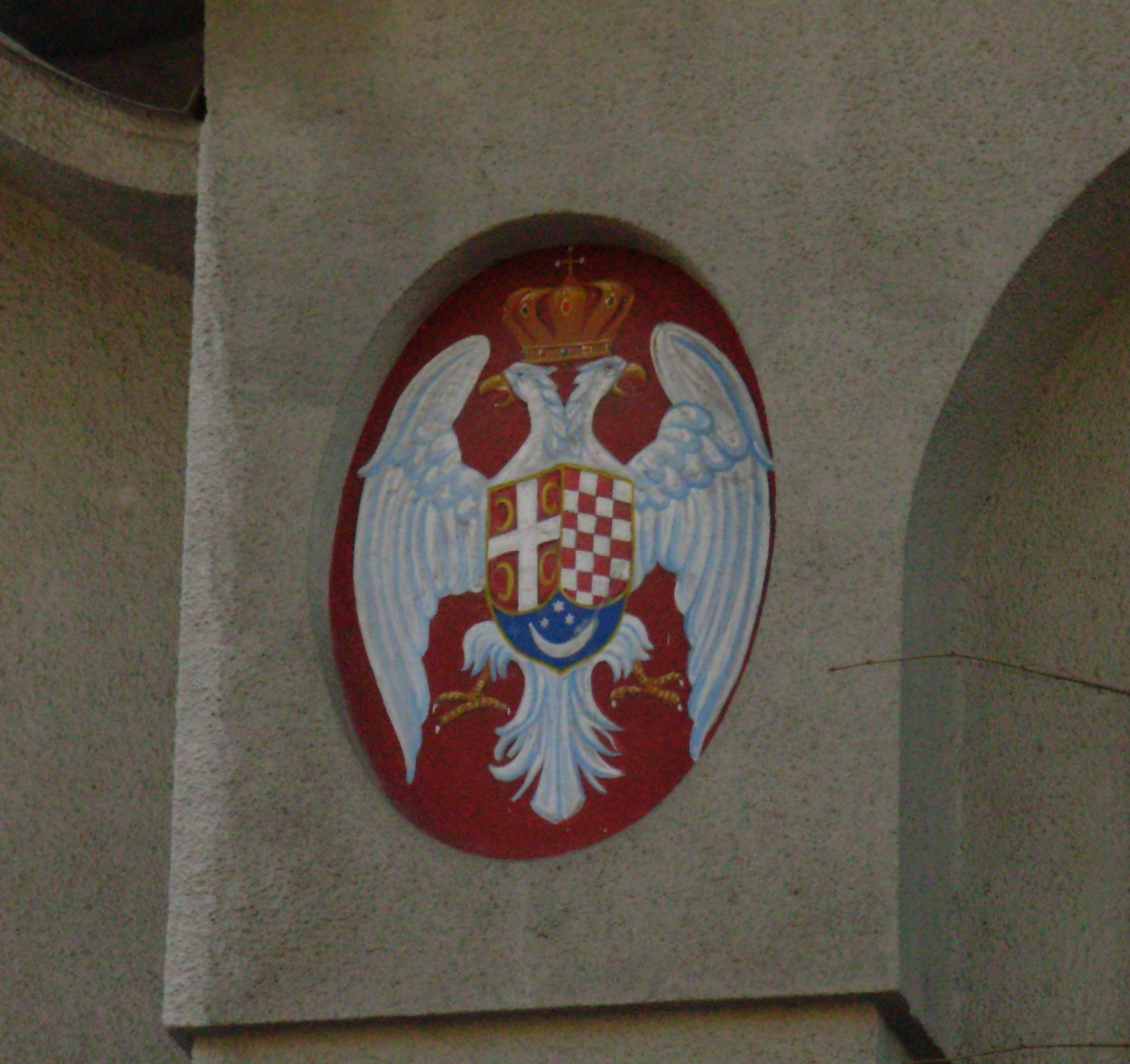 Грб краљевине Срба, Хрвата и Словенаца на згради Поште у Палмотићевој улици Београд. Сликао Голдфингер